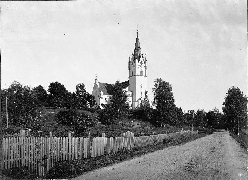 Kyrkan från nordväst med omgivningar. Kategori: (01) ExteriörerKyrkan från nordväst med omgivningar.